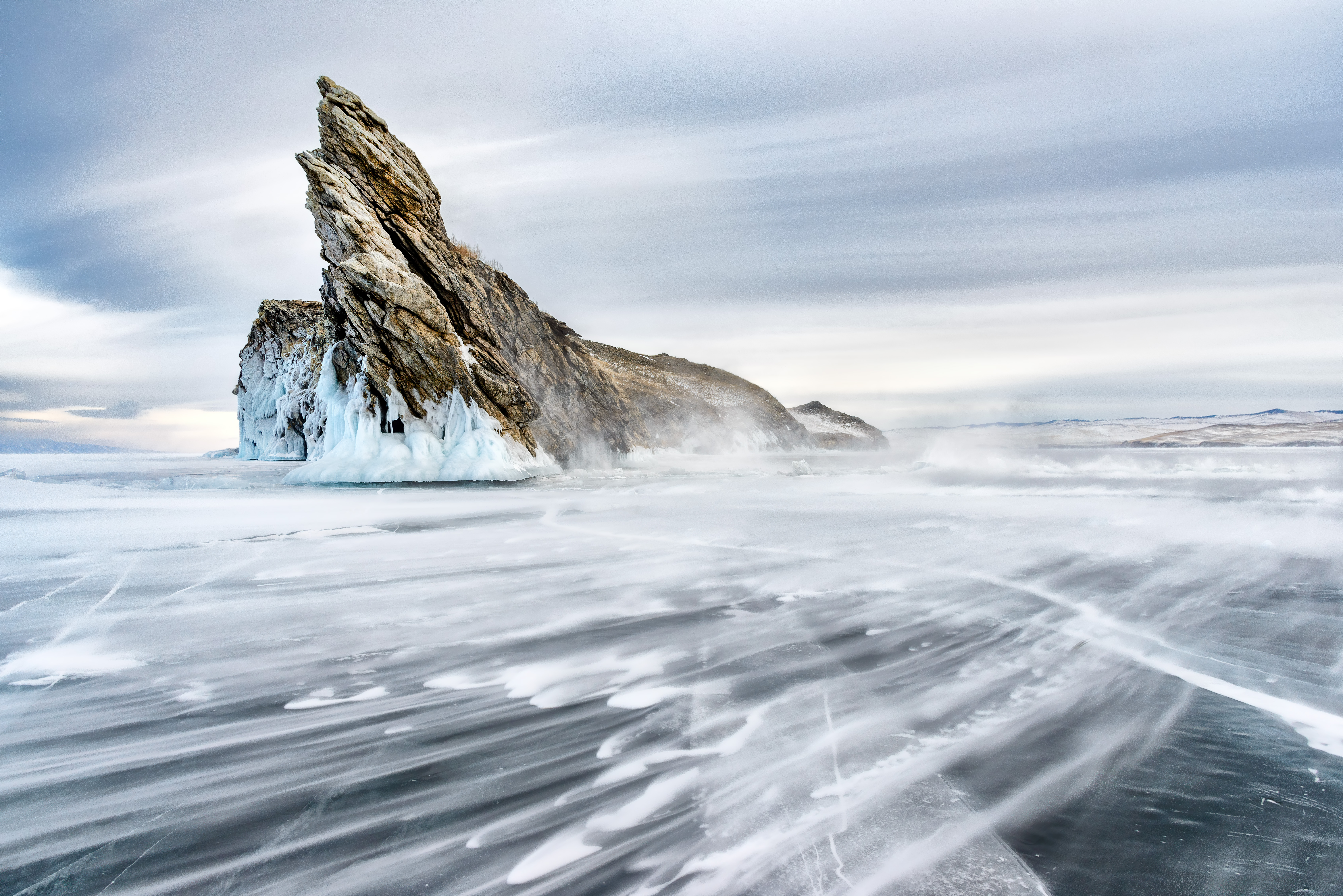 Острова пролива Малое Море на Байкале: Ольхонский район, Иркутская область This image is related to the protected area of Russia number 3810290